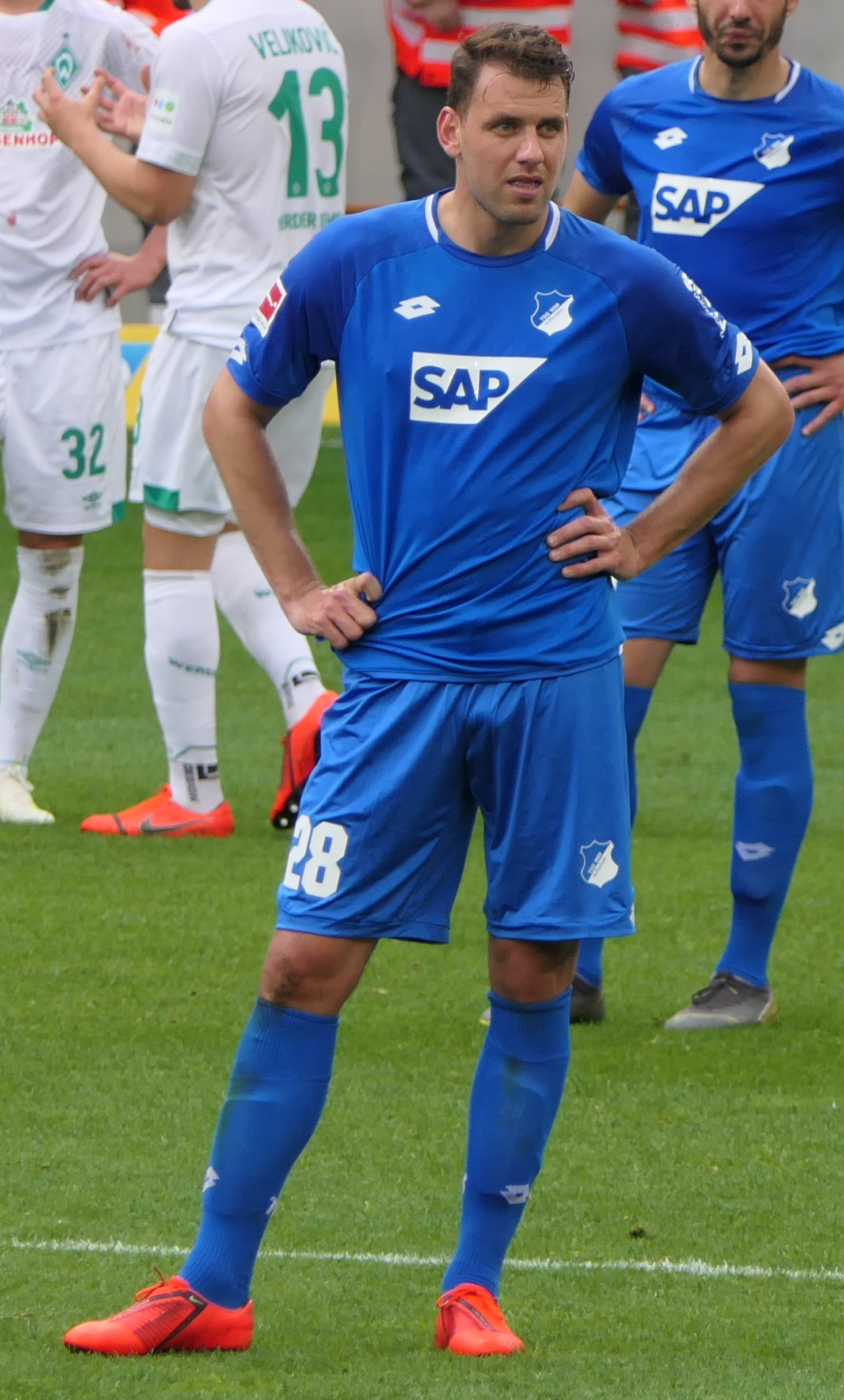 Der Fussballprofi Ádám Szalai im Trikot der TSG 1899 Hoffenheim beim Heimspiel gegen den SV Werder Bremen am 11.05.2019.